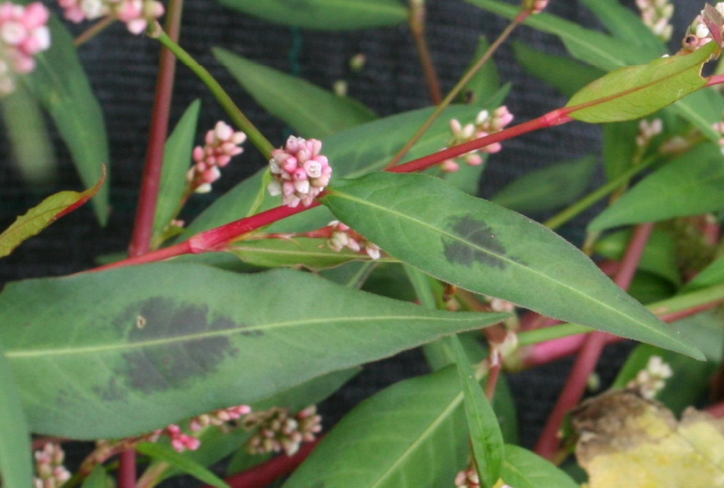 Persicaria_maculosa (sinonimo Polygonum persicaria) Località Villa Prima, Limana (BL), quota 350 m s.l.m.